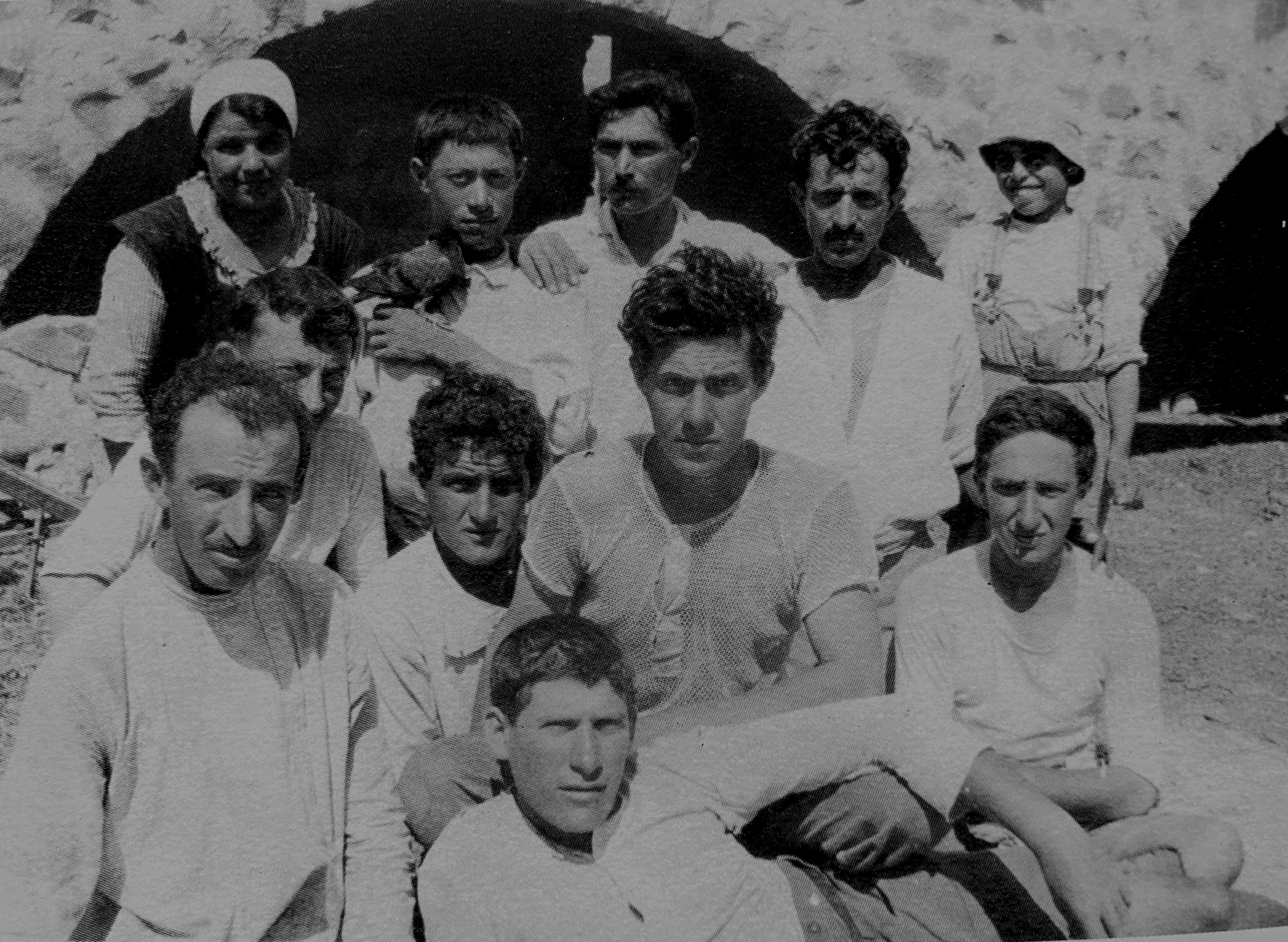 זלמן בלחובסקי בחצר תל-חי (ראשון מימין), ראשון משמאל שניאור שפושניק